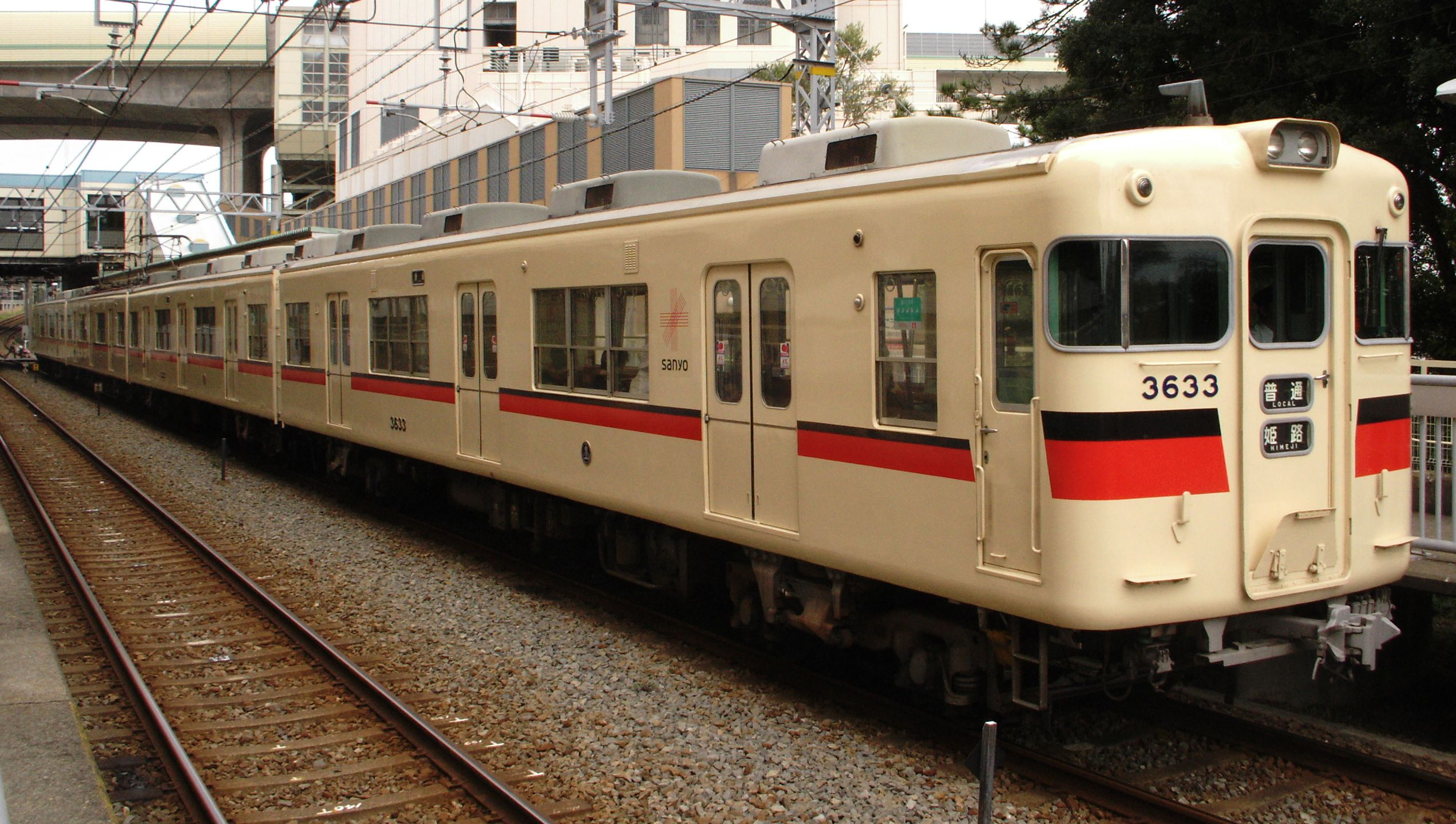 山陽電気鉄道3000系電車